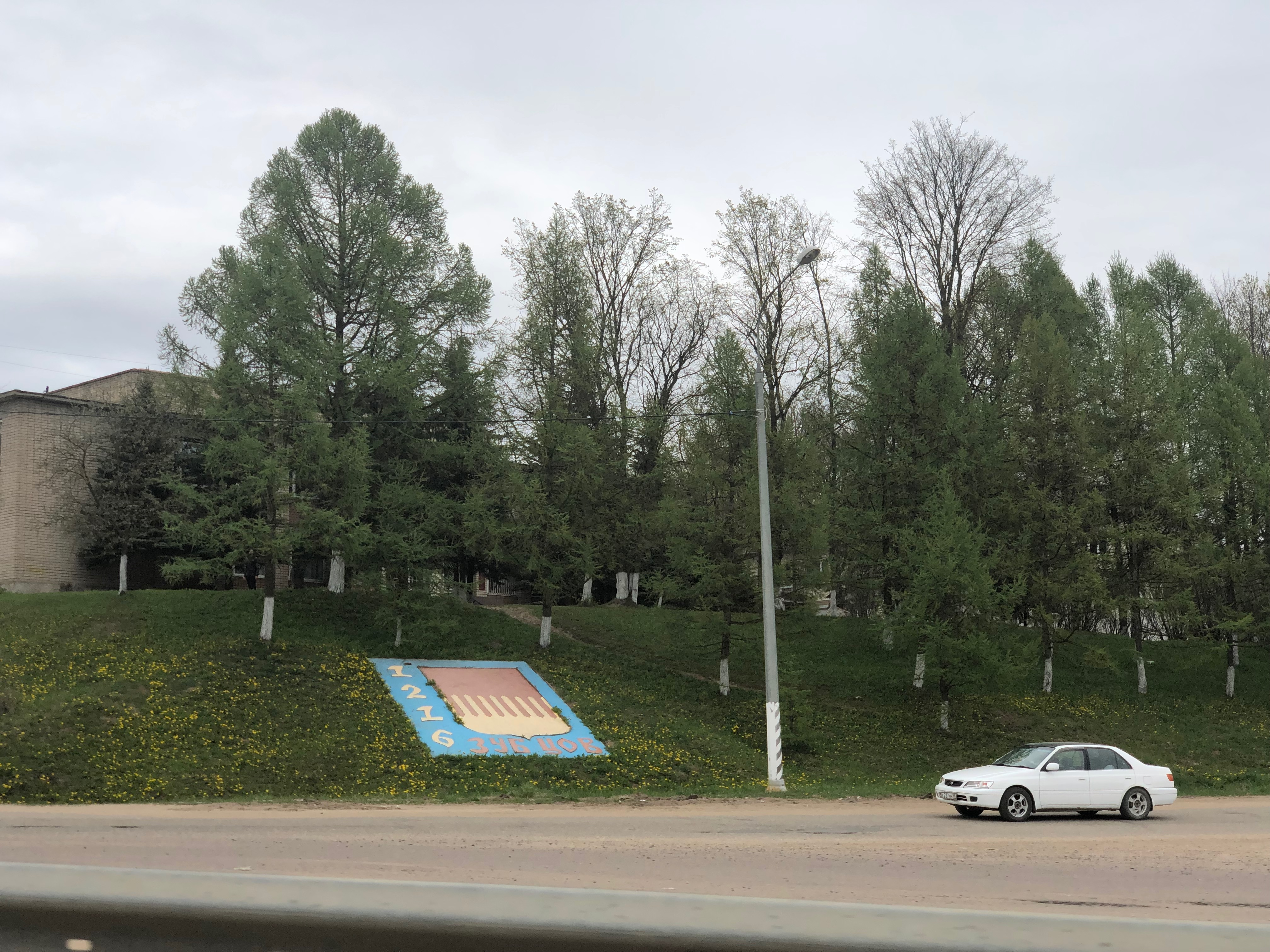 Зубцов